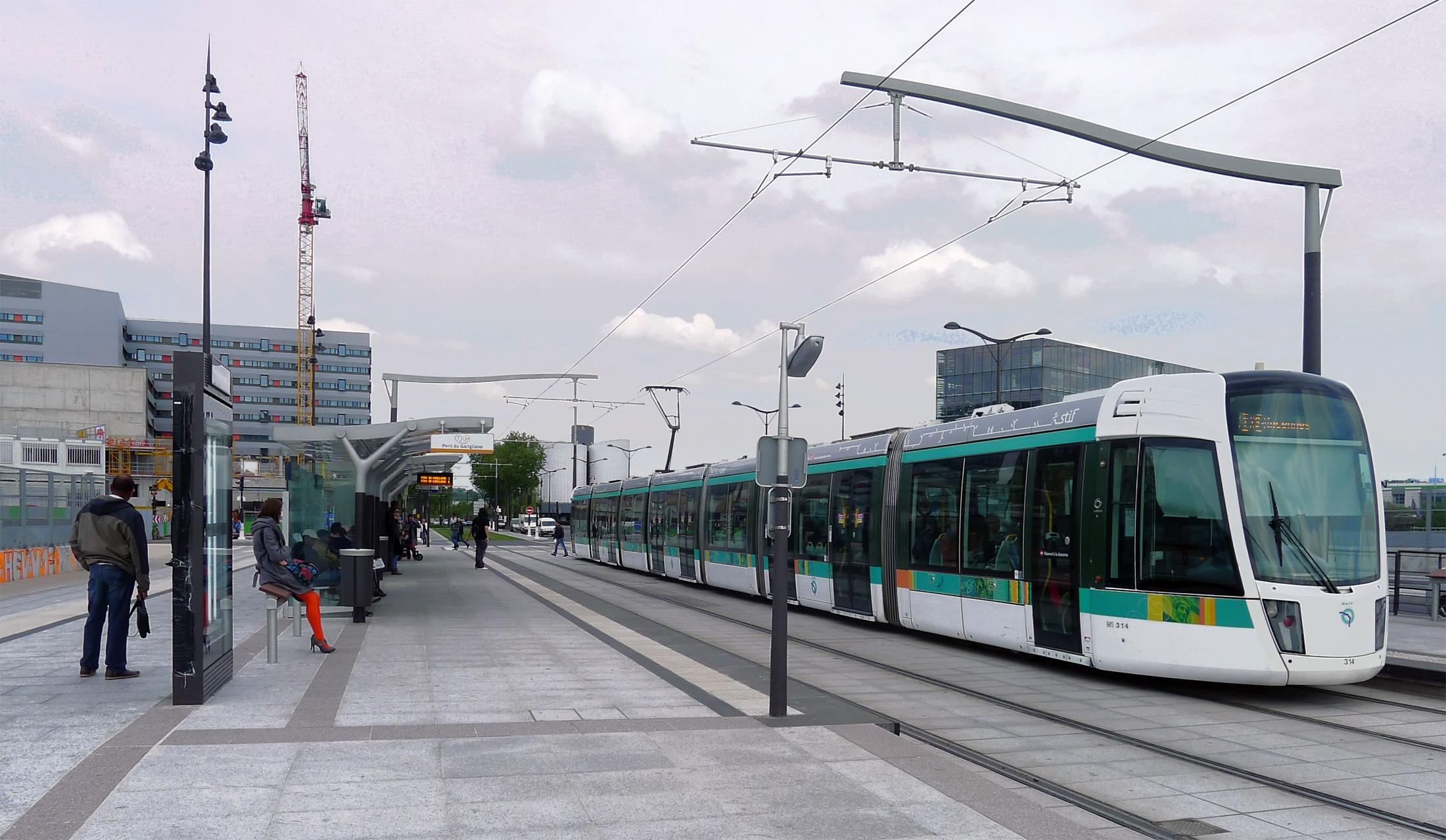 Boulevard Masséna et ligne de tramway T3a (station "Avenue-de-France") - Paris XIII